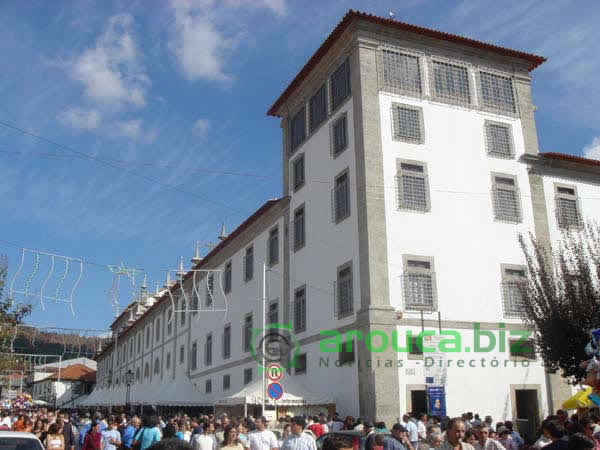 Mosteiro de Arouca em dia de Feira das Colheitas